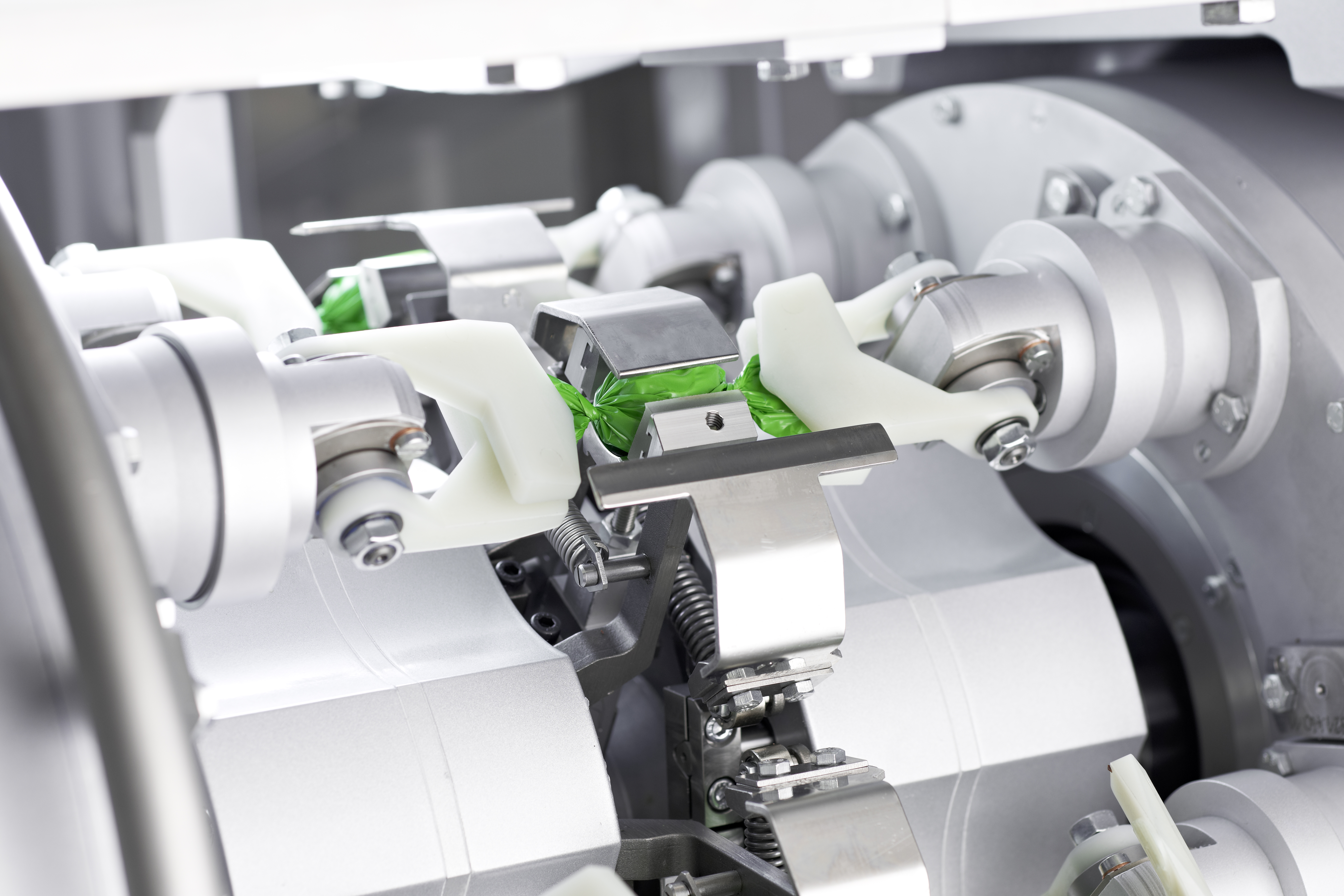 Detailansicht Verpackungsmaschine Suesswaren